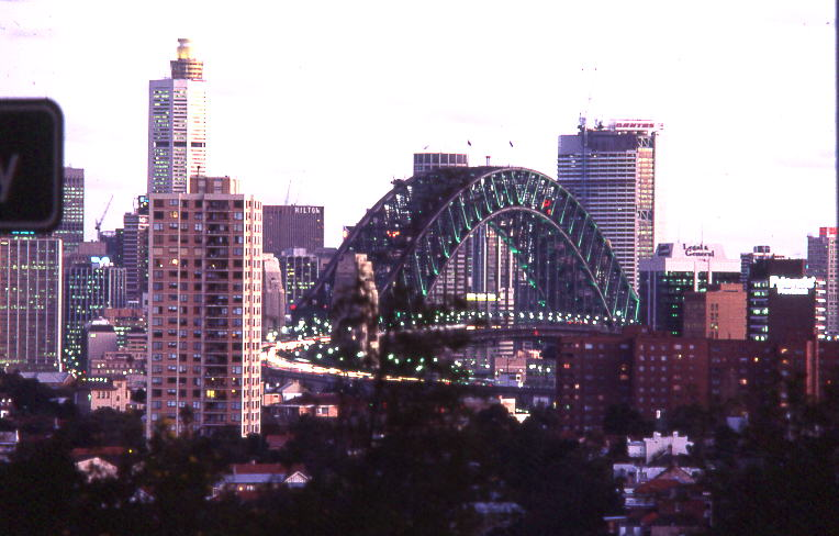 sydney harbour bridge